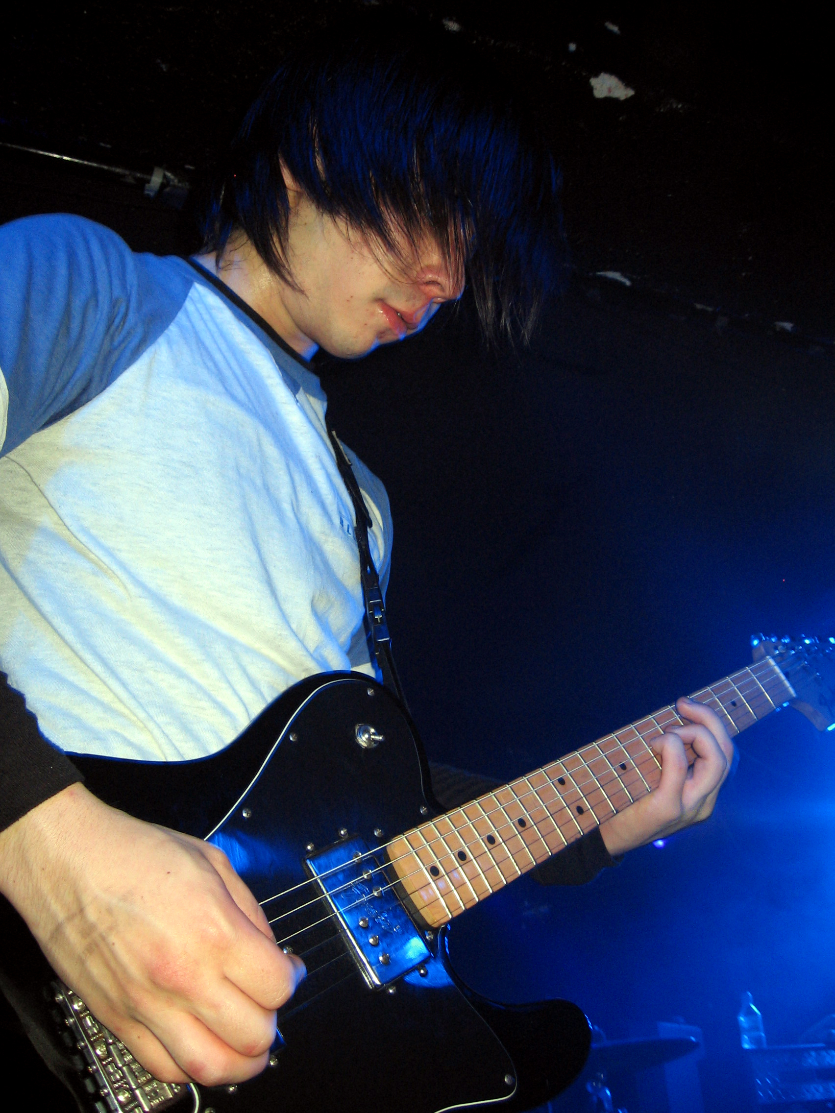 Ben Jorgensen of Armor for Sleep.